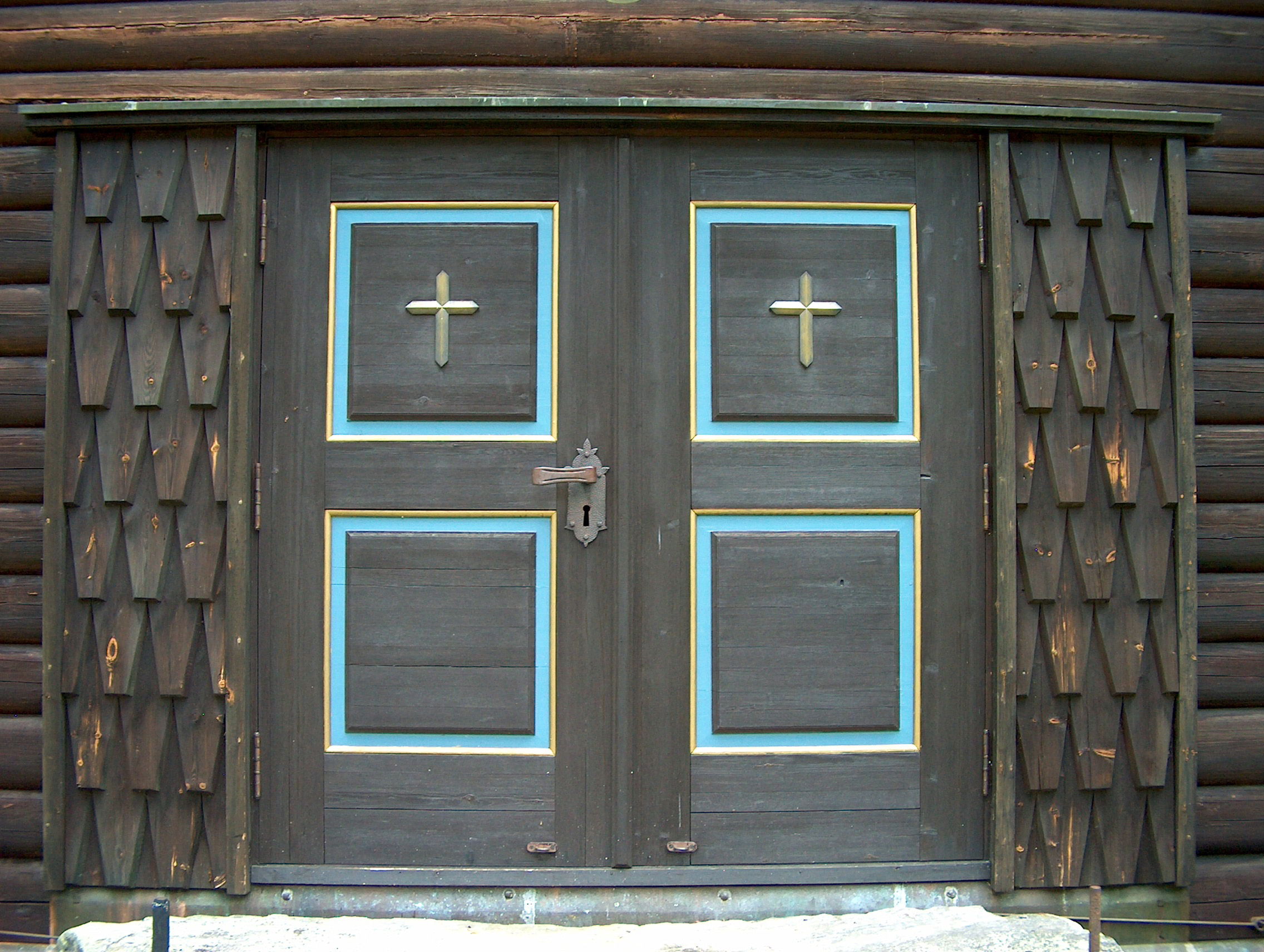 Strømsoddbygda kapell (vestportalen)